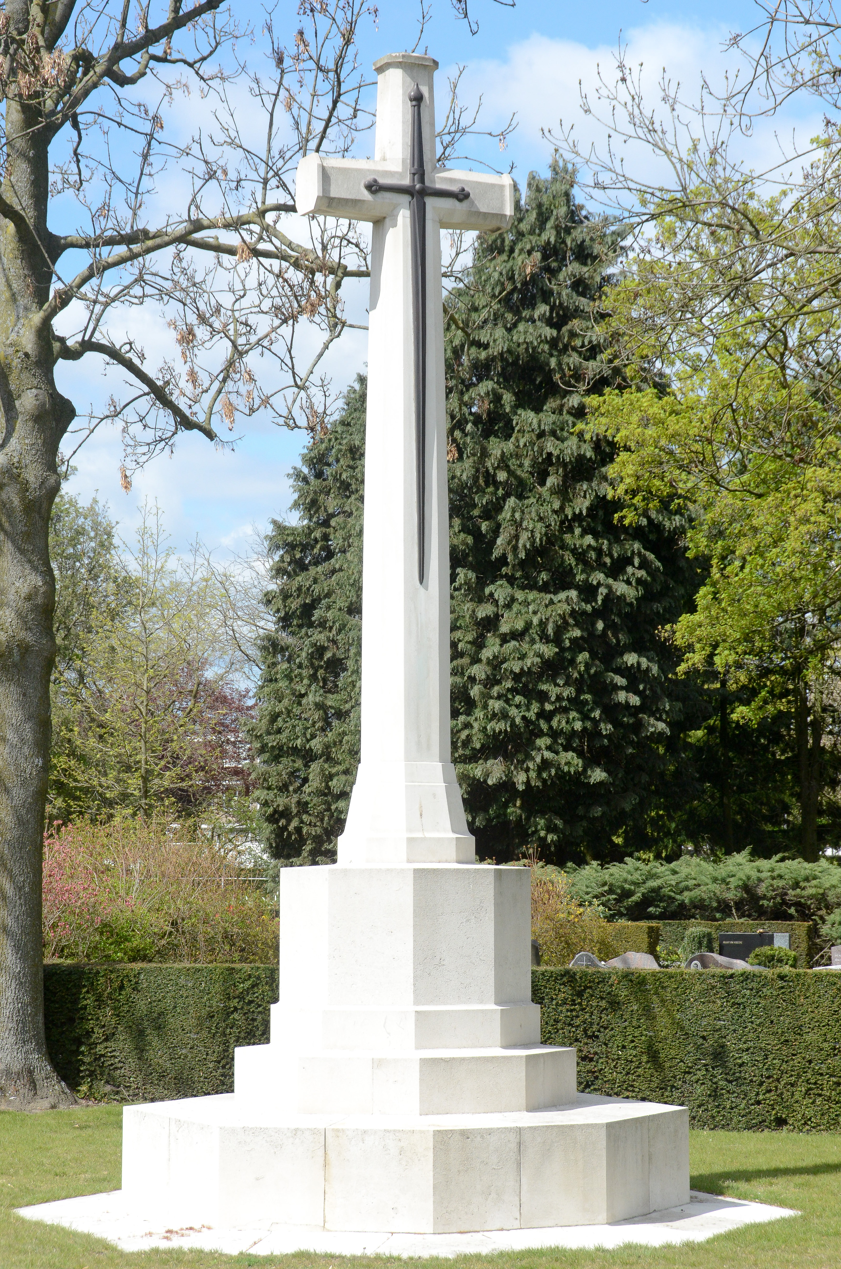 Offerkruis op het ereveld van het Gemenebest op de gemeentelijke begraafplaats Oude Toren in stadsdeel Woensel van de gemeente Eindhoven.